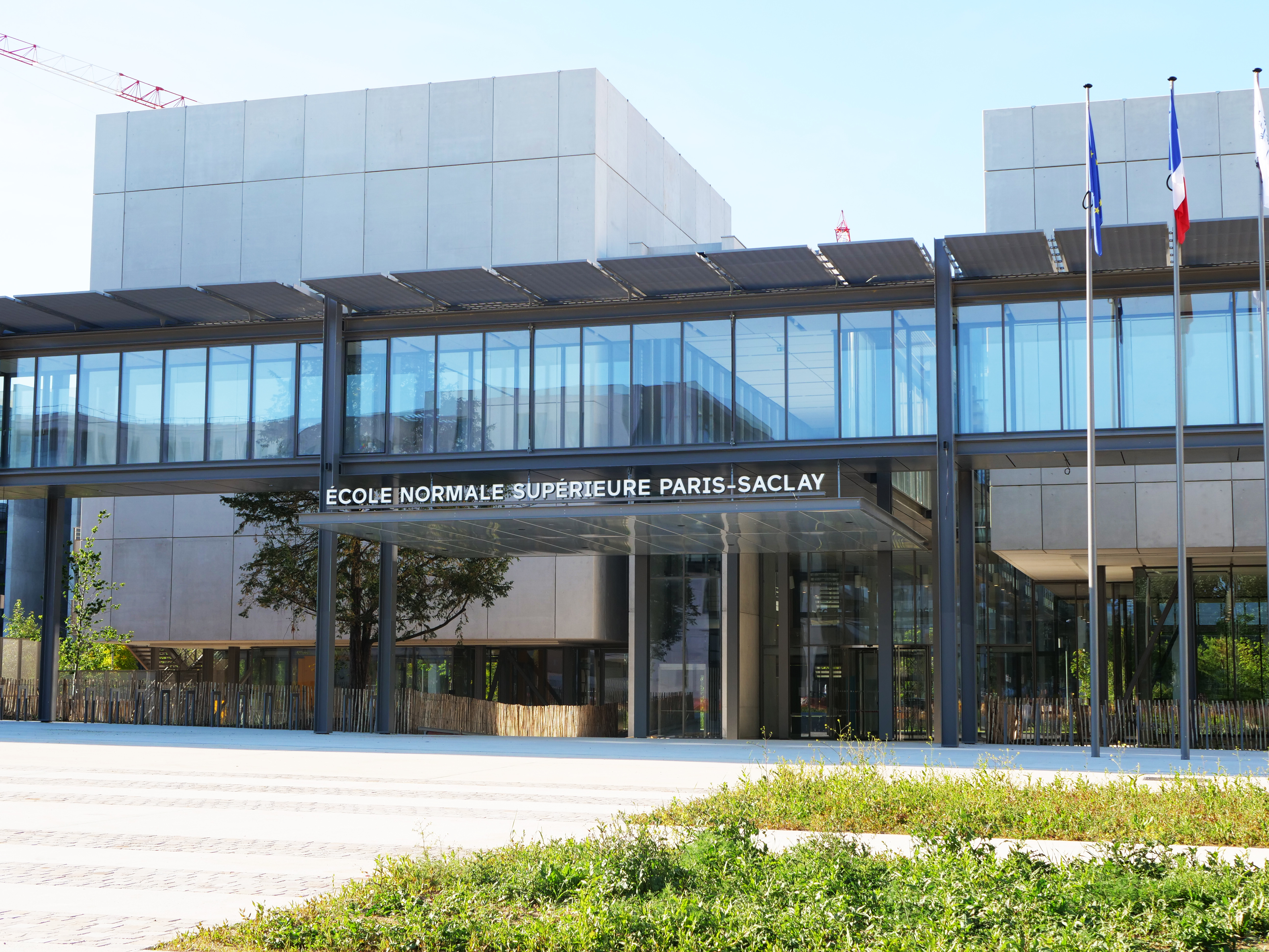 Vue sur l'entrée de l'École normale supérieure Paris-Saclay de l'université Paris-Saclay depuis l'Avenue des Sciences, dans le quartier de Moulon, à Gif-sur-Yvette.